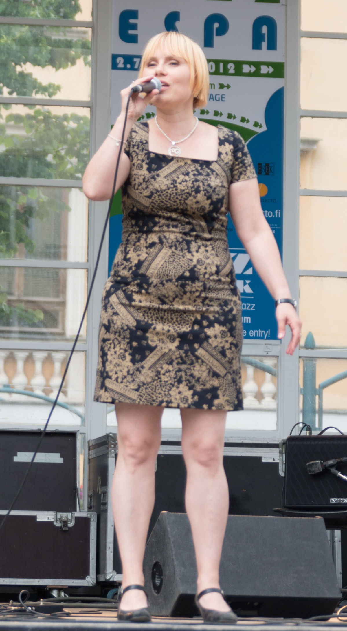 Katri Somerjoki suomalainen laulaja